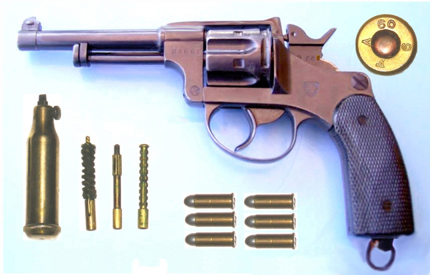 Schweizer Revolver 82-29